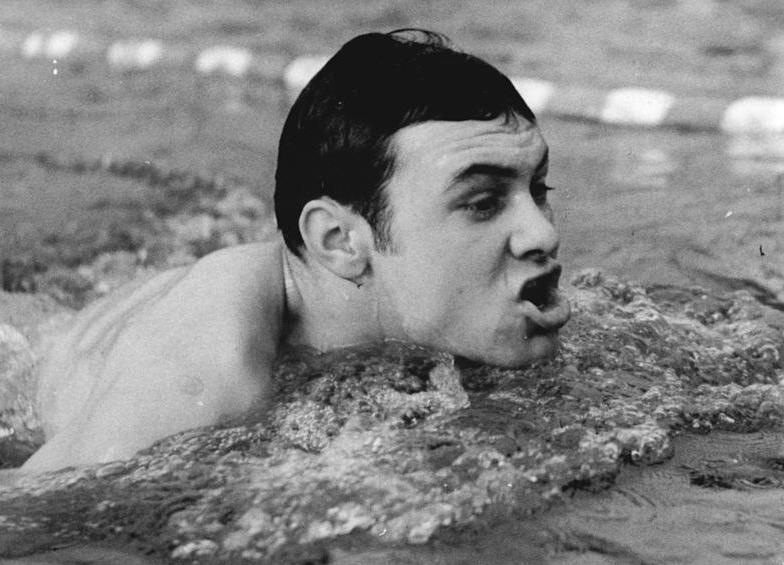 Willi Meßner Zentralbild Gößler 7.4.1961 Brustschwimmer Willi Meßner Mit zu den besten Brustschwimmern in der DDR zählt der Berliner Dynamosportler Willi Meßner. UBz: Willi Meßner beim 200-m-Brustschwimmen.